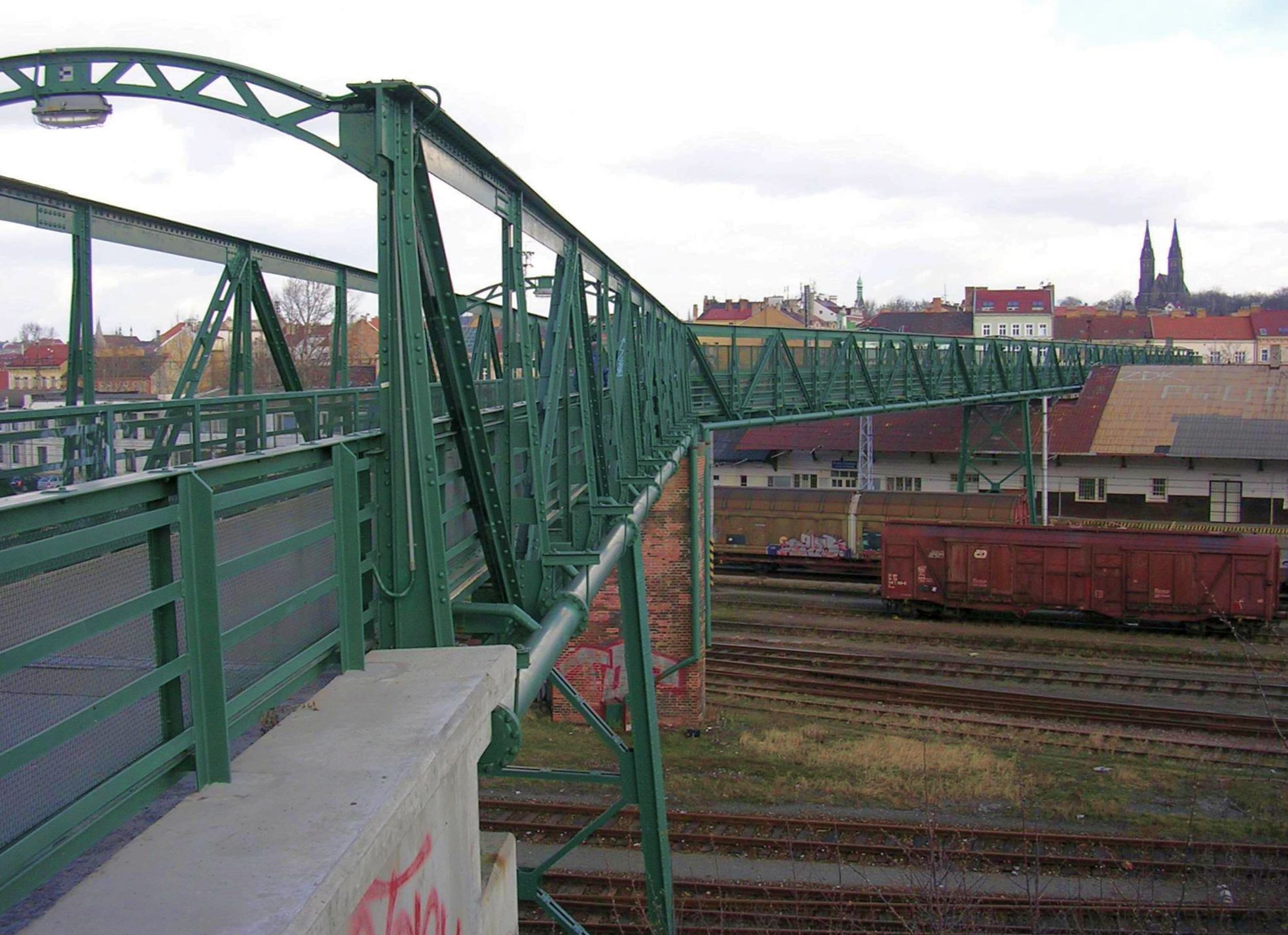 Praha, Smíchov, lávka přes Smíchovské nádraží, v pozadí Vyšehrad